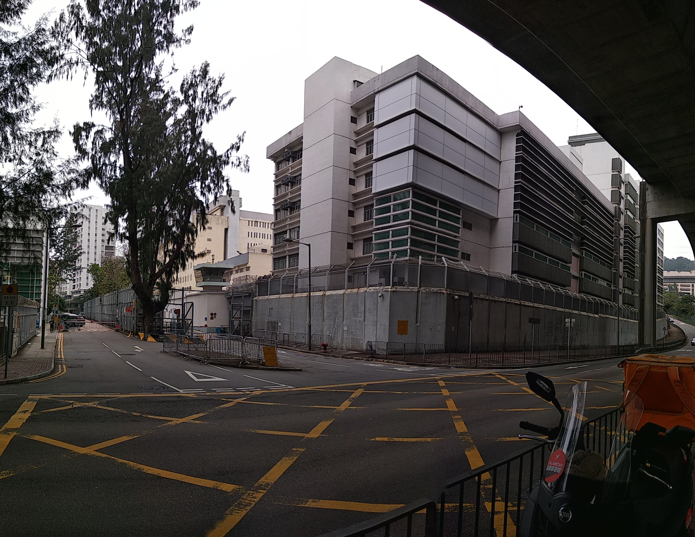 中文（香港）: 荔枝角懲教所